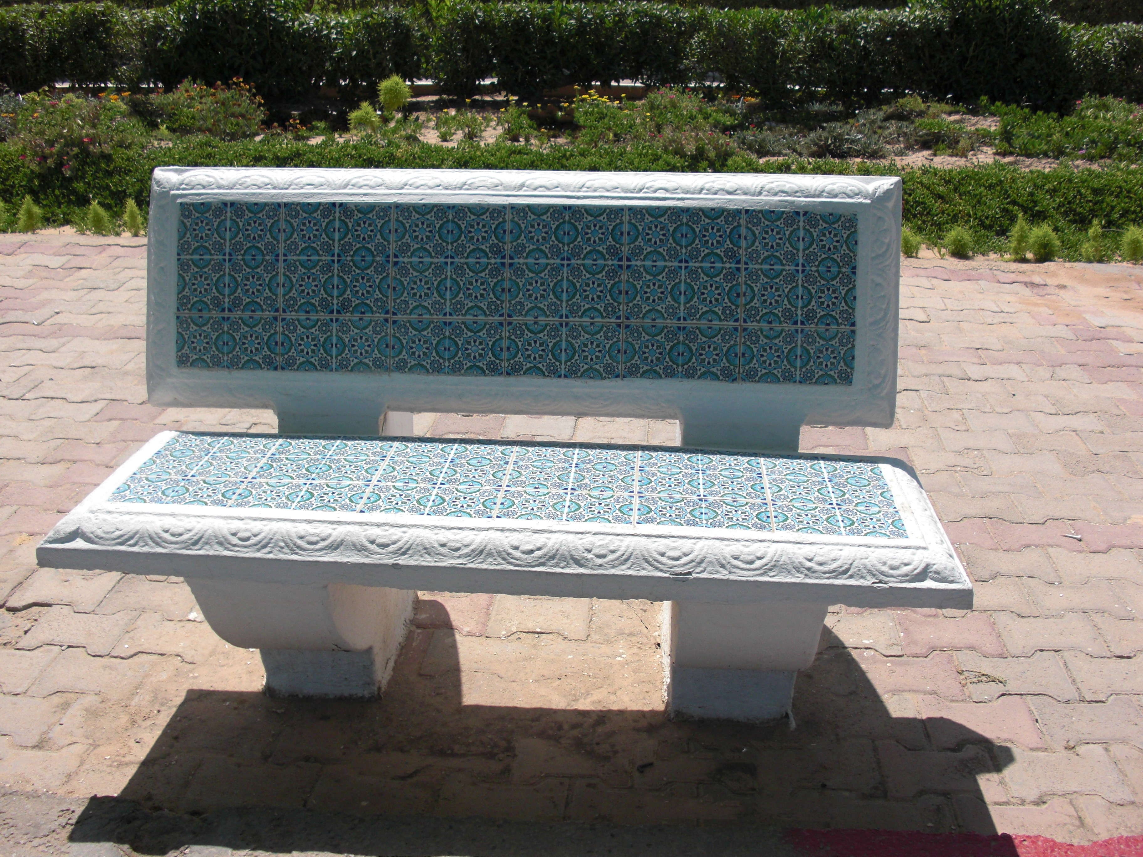 Banc public à Lyon, type en béton des années 50